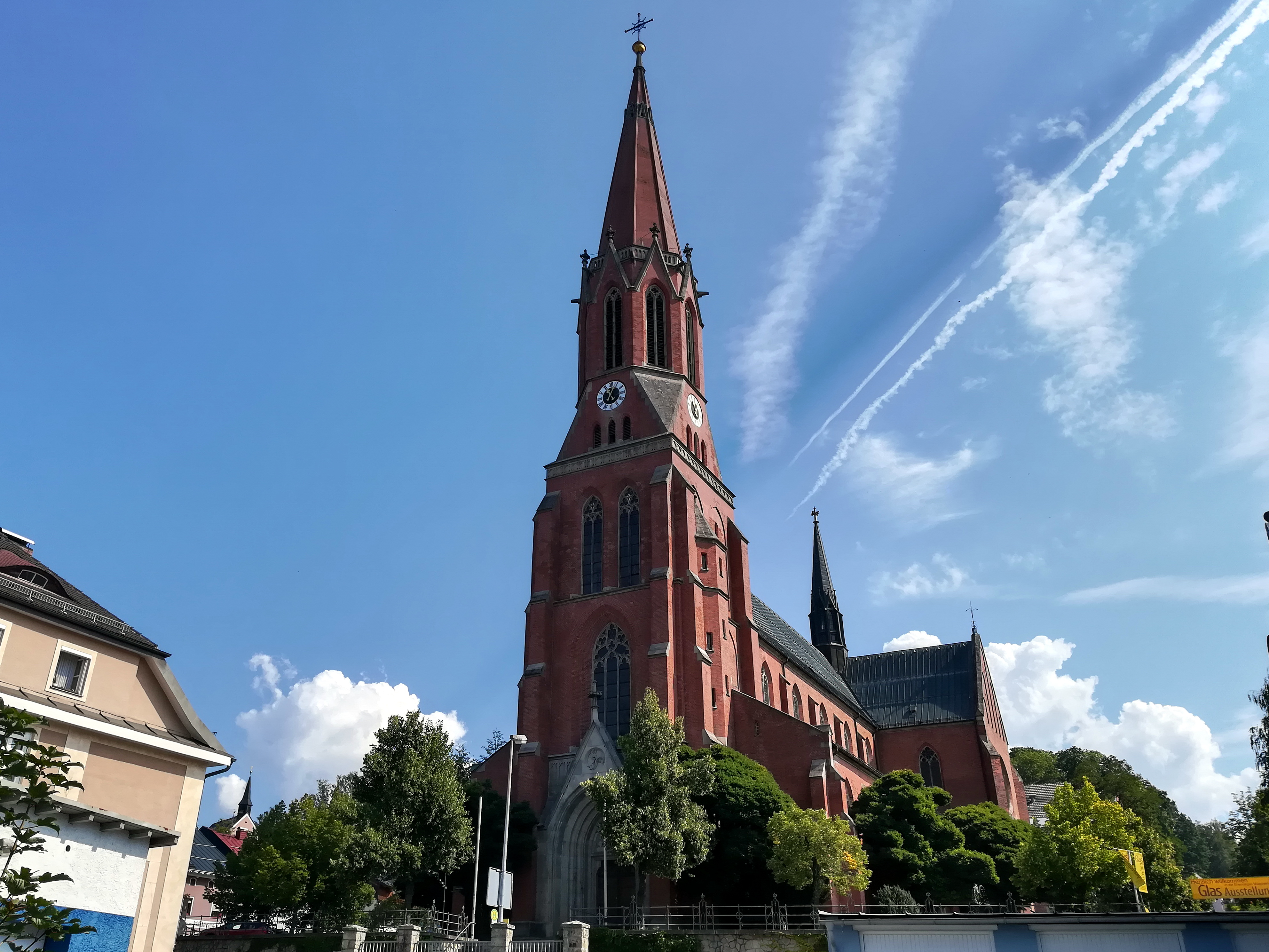 Die katholische Stadtpfarrkirche St. Nikolaus in Zwiesel ist ein neugotischer, aus Backstein errichteter dreischiffiger Kirchenbau mit einem Querschiff und Turm.